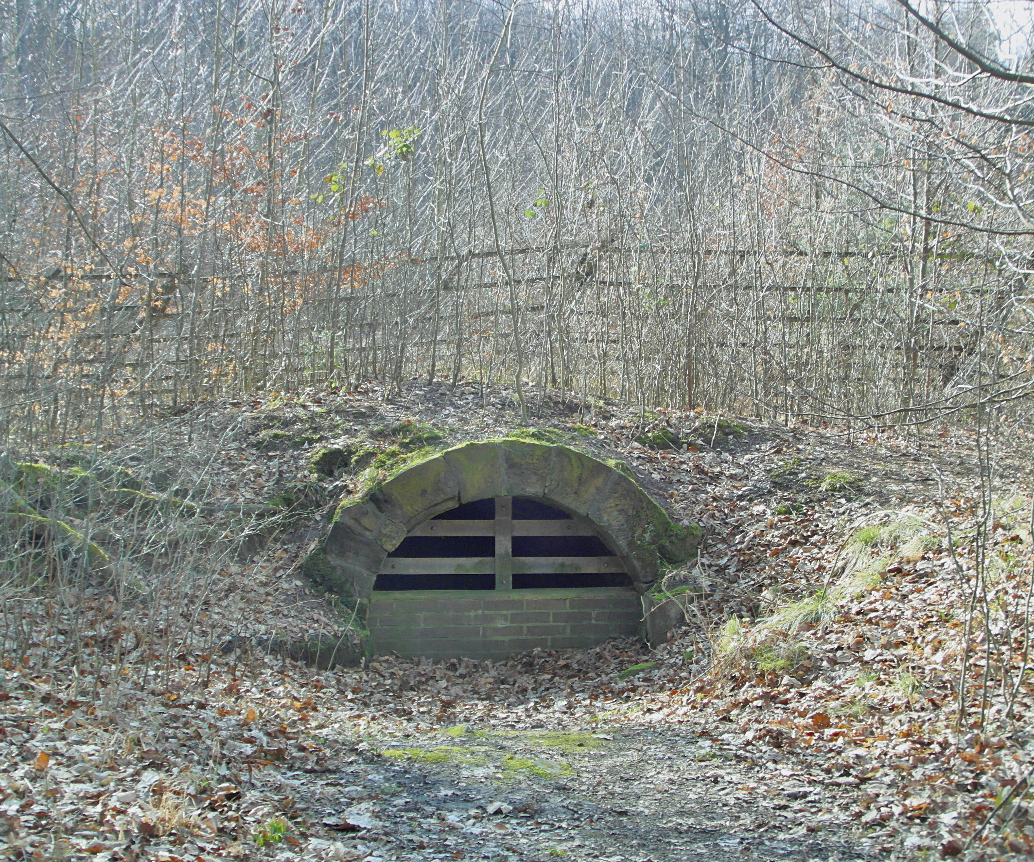 Im König-Wilhelm-Stollen wurde Steinkohle gefördert. Wird zur Unterscheidung vom benachbarten gleichnamigen Vorgänger oft Eisenbahnerstollen genannt. Der Stollen stellt ein in Niedersachsen nach Anzahl und Artenvielfalt einmaliges Quartier der vom Aussterben bedrohten streng geschützten Fledermäuse dar. (Naturdenkmal ND-H 157)